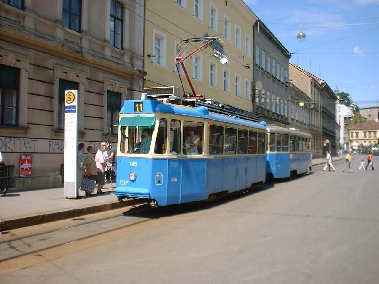 Tram in Zagreb